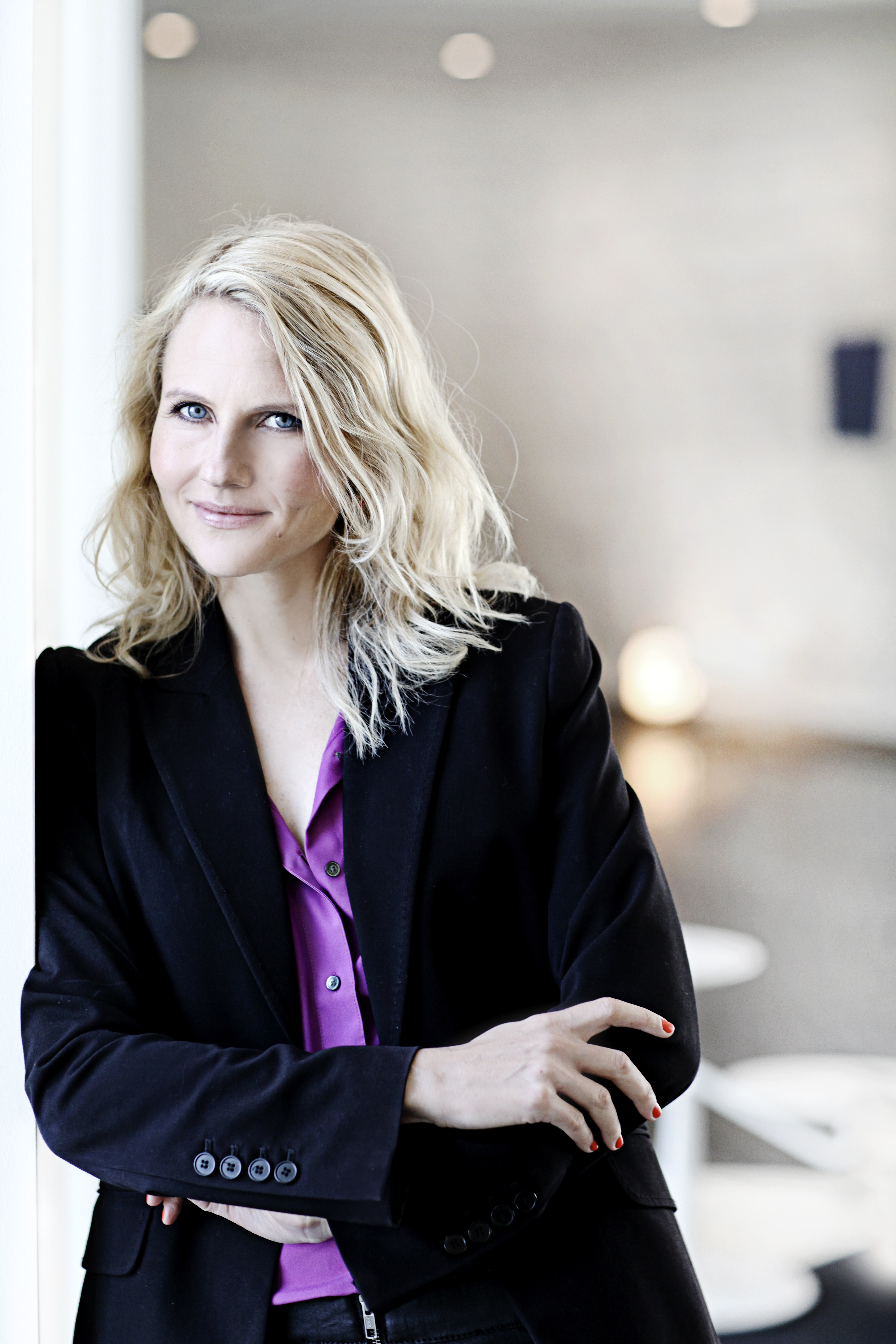 Christiane Vejlø, fremtidsforsker, blogger, radio- og tvvært Elektronista.dk